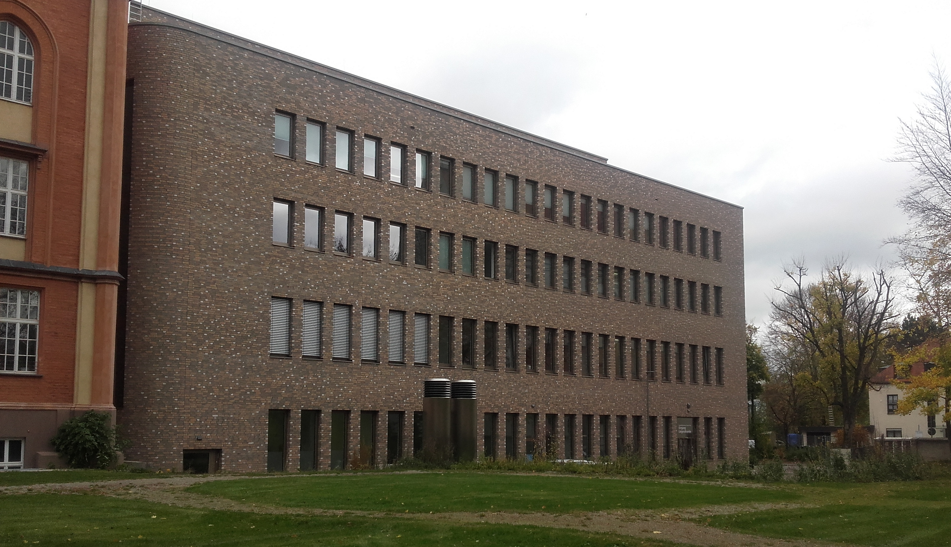 Blick auf die Südseite des Gesundheitszentrums beim Vincentinum in Augsburg